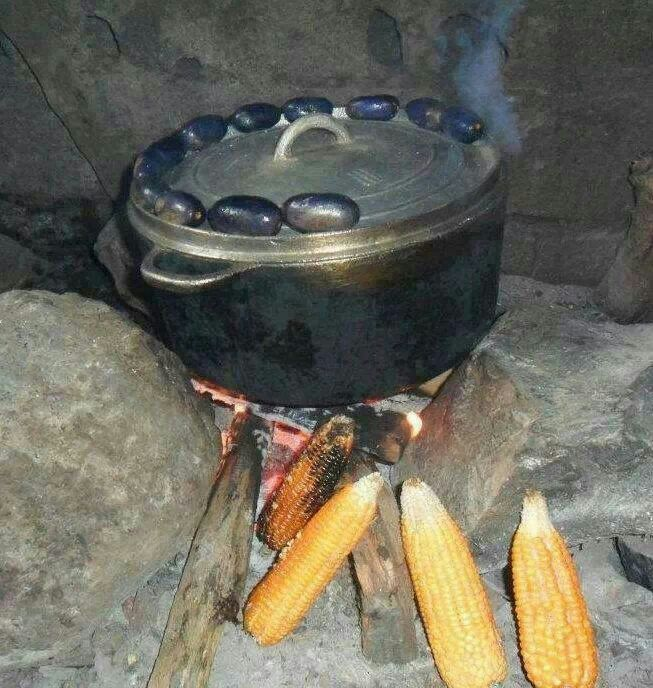 Pendant la cuisson, on fait cuire aussi les safoues et griller du maîs